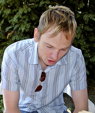 Siemon Edward Top (Ommen, 1 januari 1972), een Nederlands componist. In 2006 gefotografeerd door Marten Top